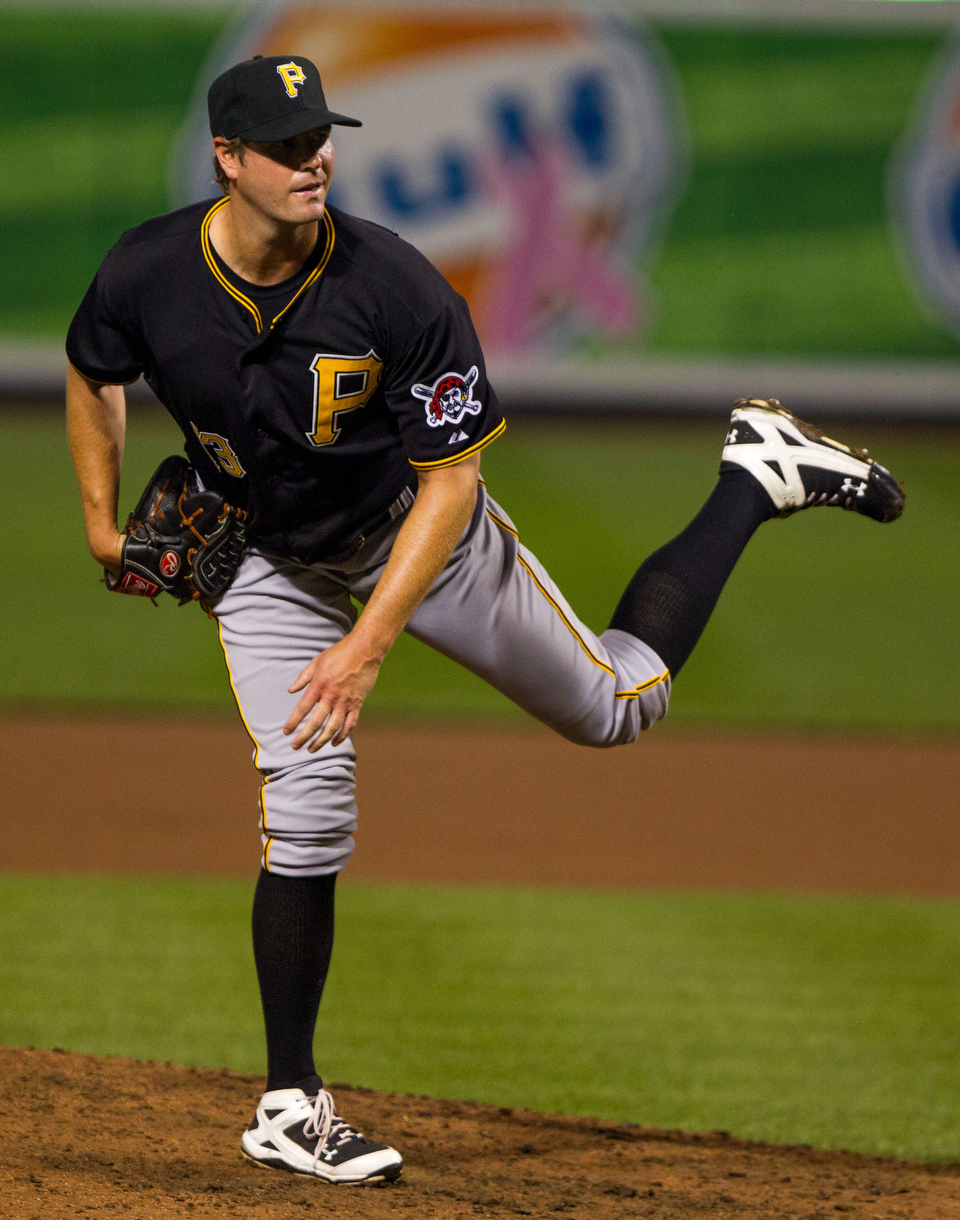 Doug Slaten